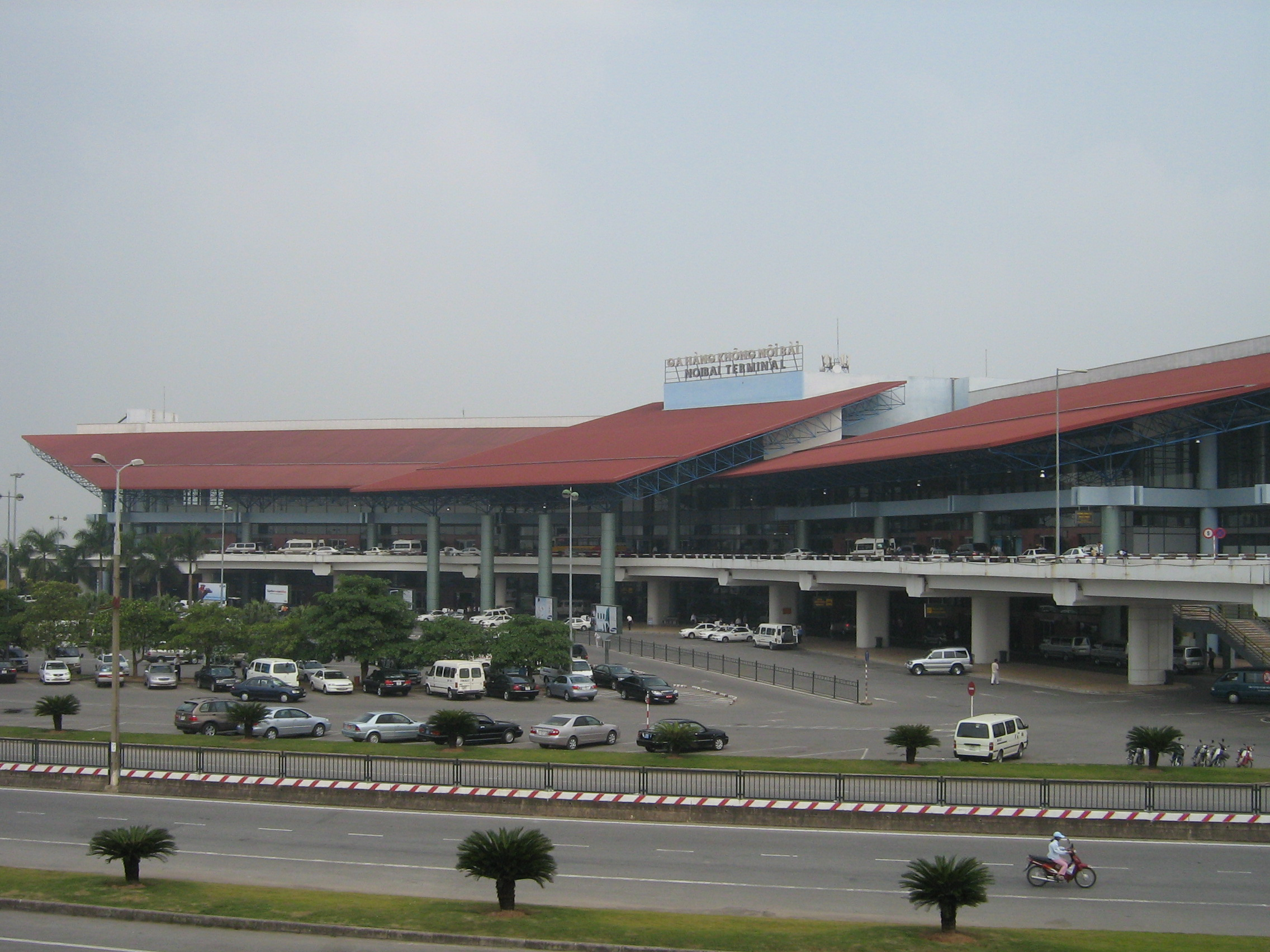 Terminal1 am Flughafen von Hanoi